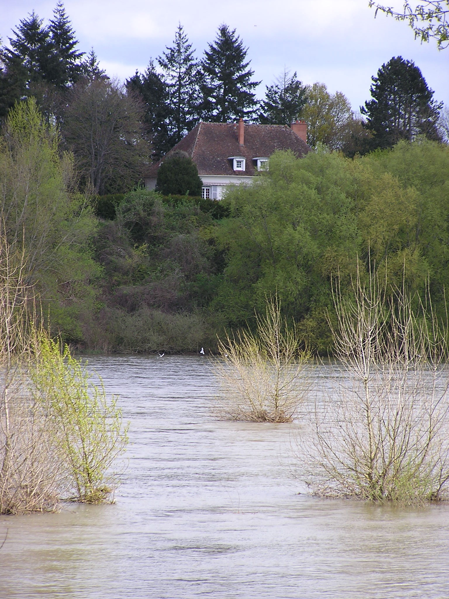 Maison de Maurice genevoix vue depuis l'autre rive (gauche) de la Loire